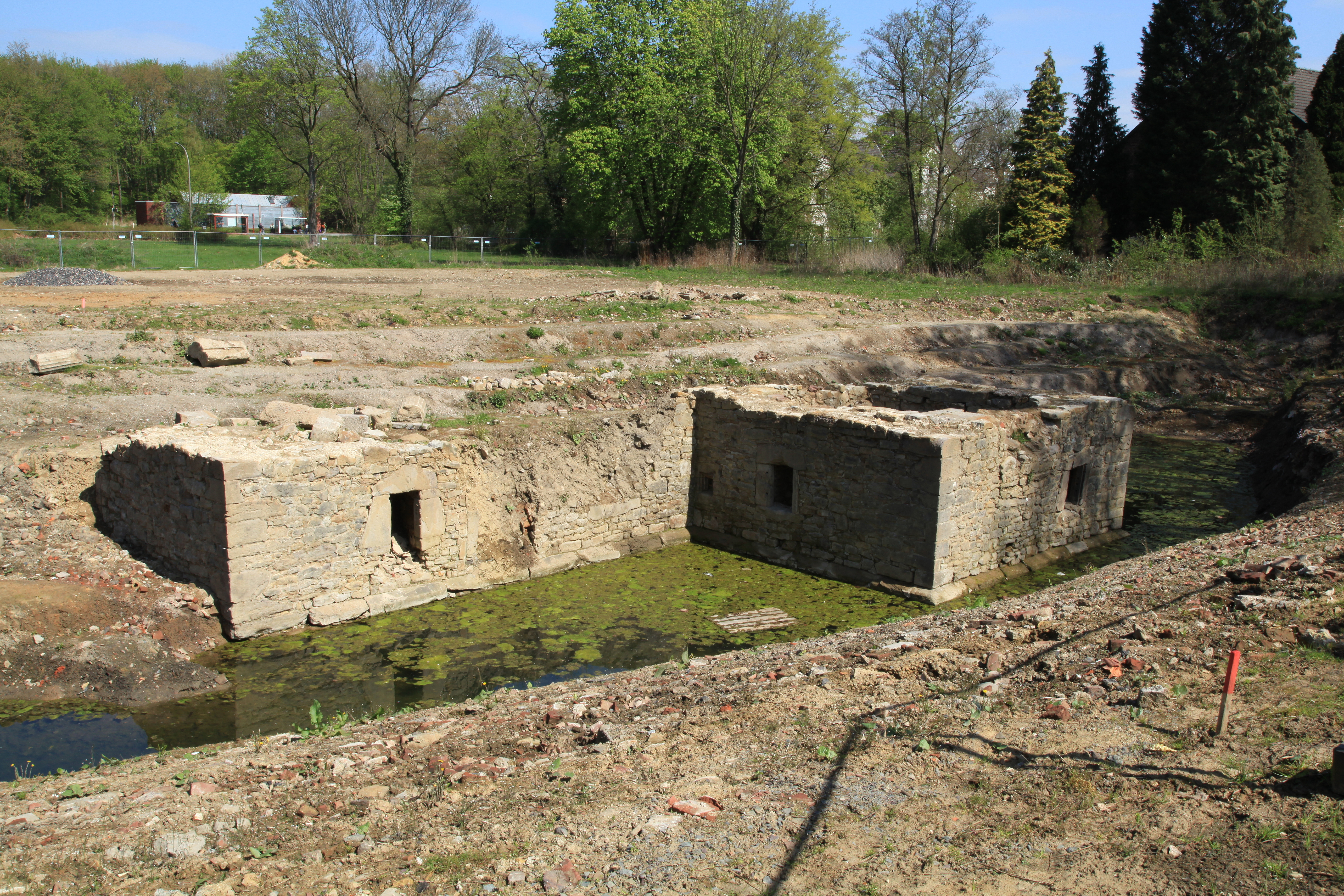 Schondelle an den wiederentdeckten Ruinen des Schlosses Brünninghausen, Am Rombergpark in Dortmund